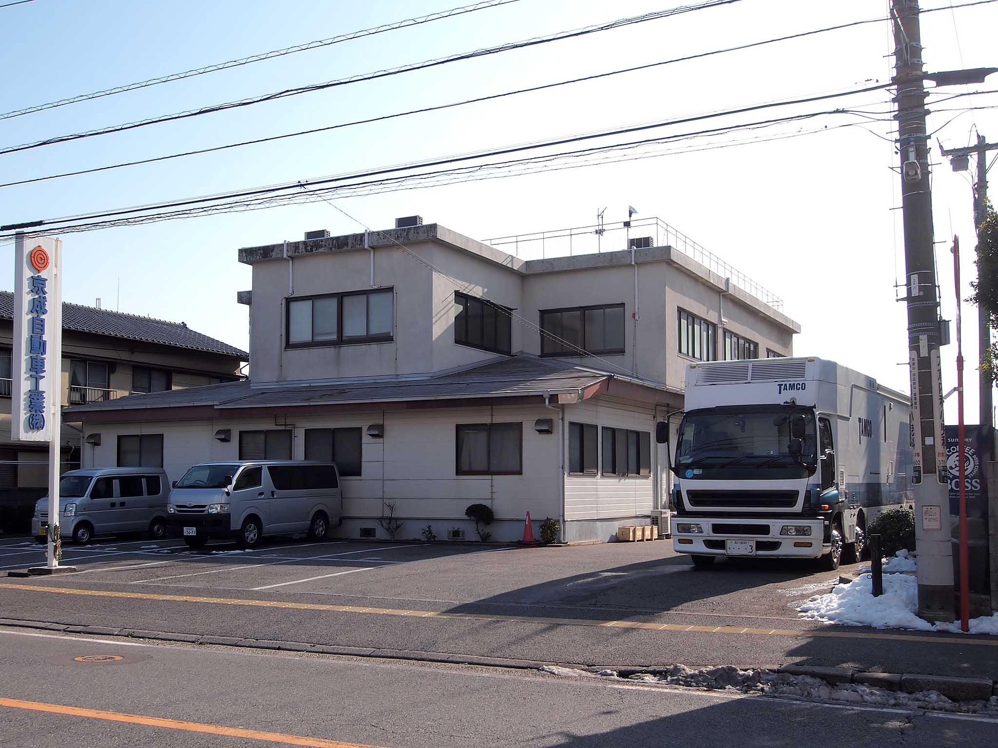 千葉県市川市東大和田にある京成自動車工業の本社工場。